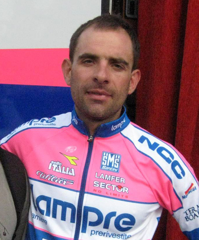 Marcin Sapa